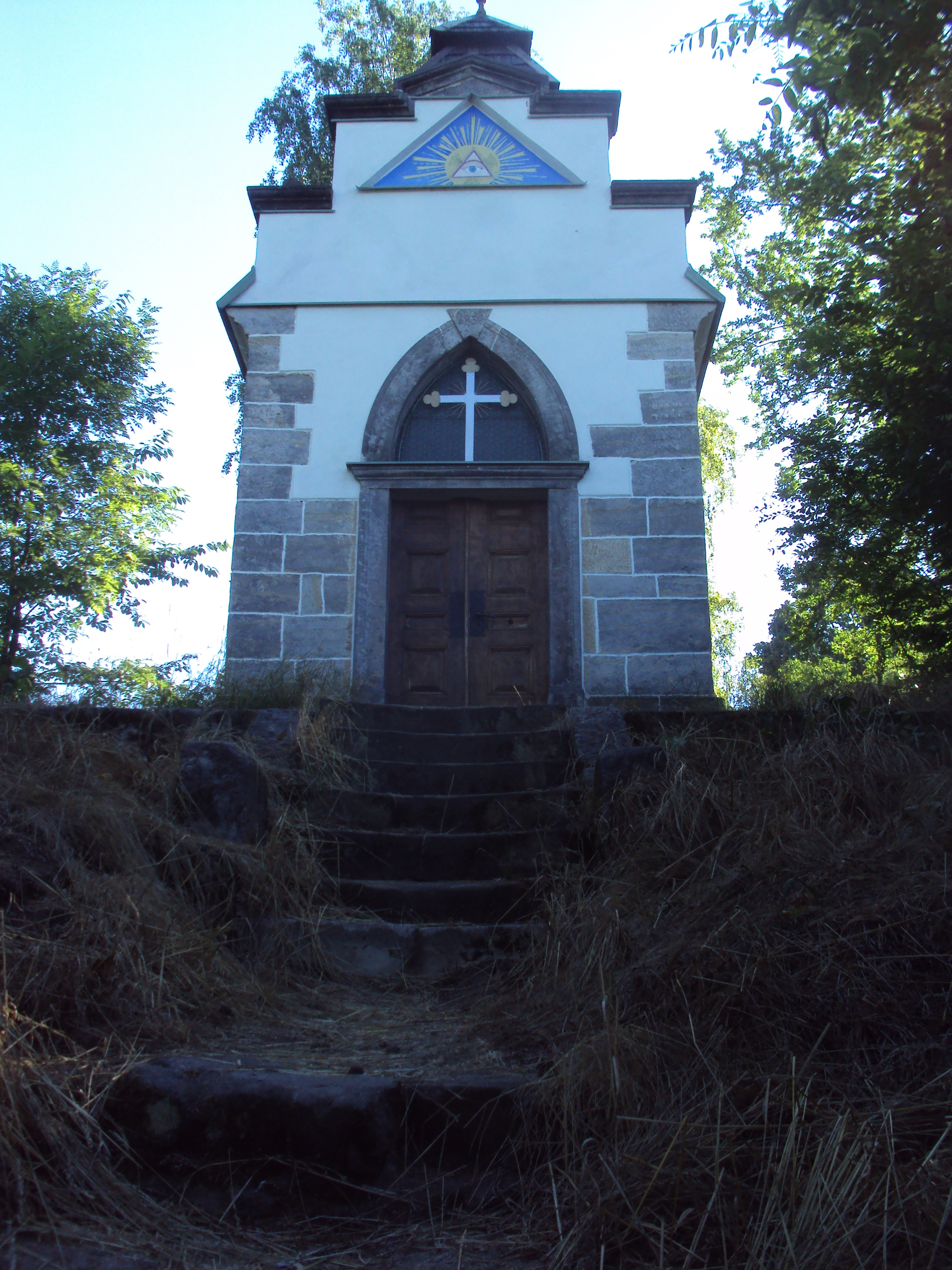 Kaple svaté Anny